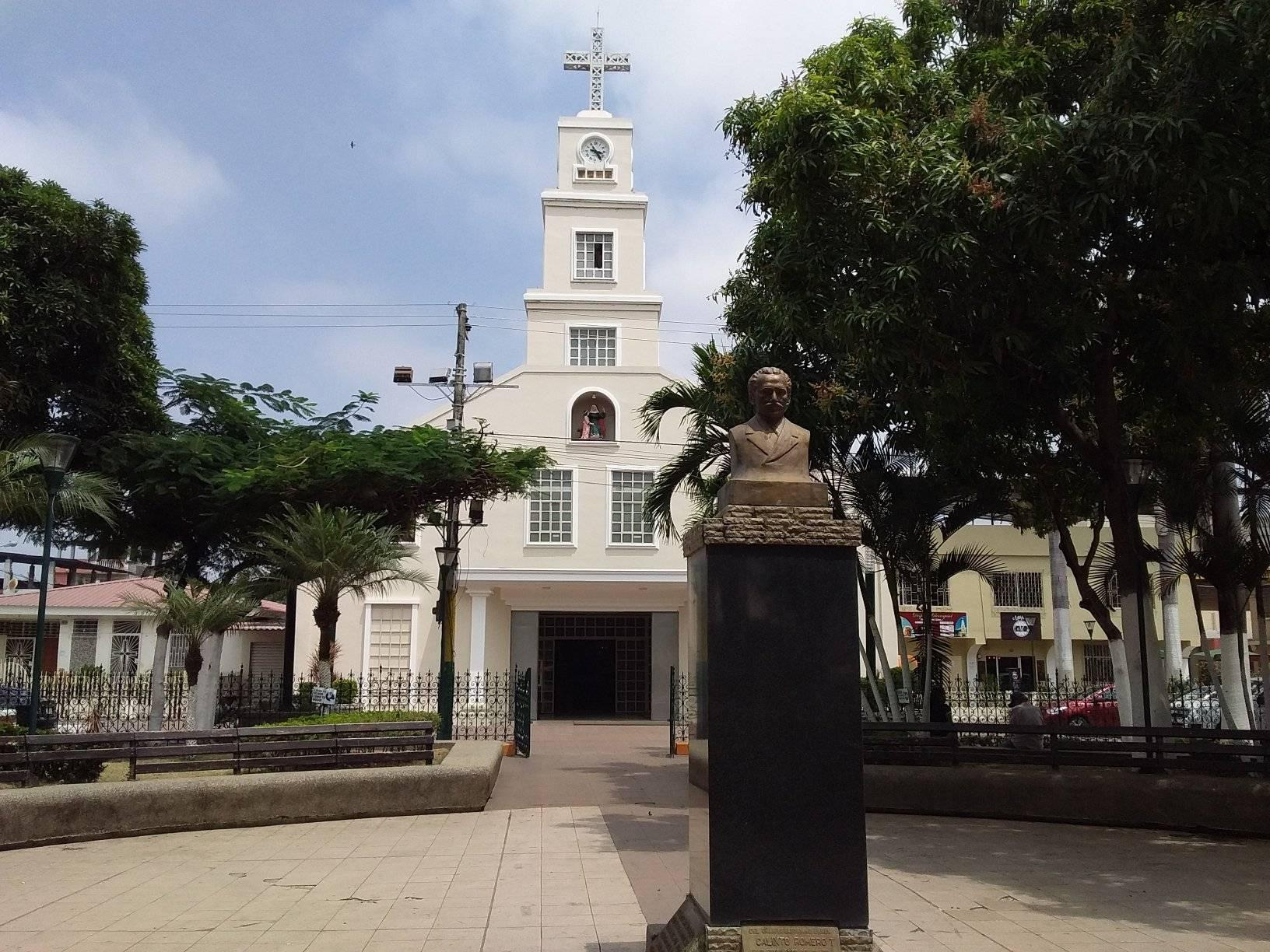 Iglesia de Santa Ana, Samborondón, Ecuador.